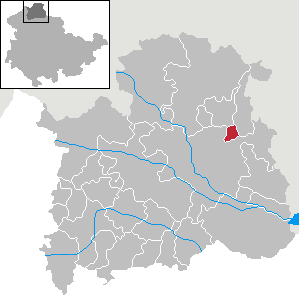 Gemeinde Buchholz in Thüringen, Landkreis Nordhausen